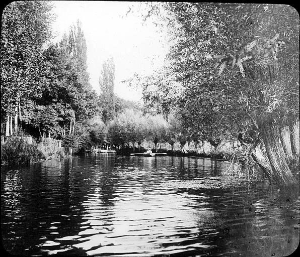 Rameur sur l'Yerres à Brunoy (Seine-et-Oise, France).